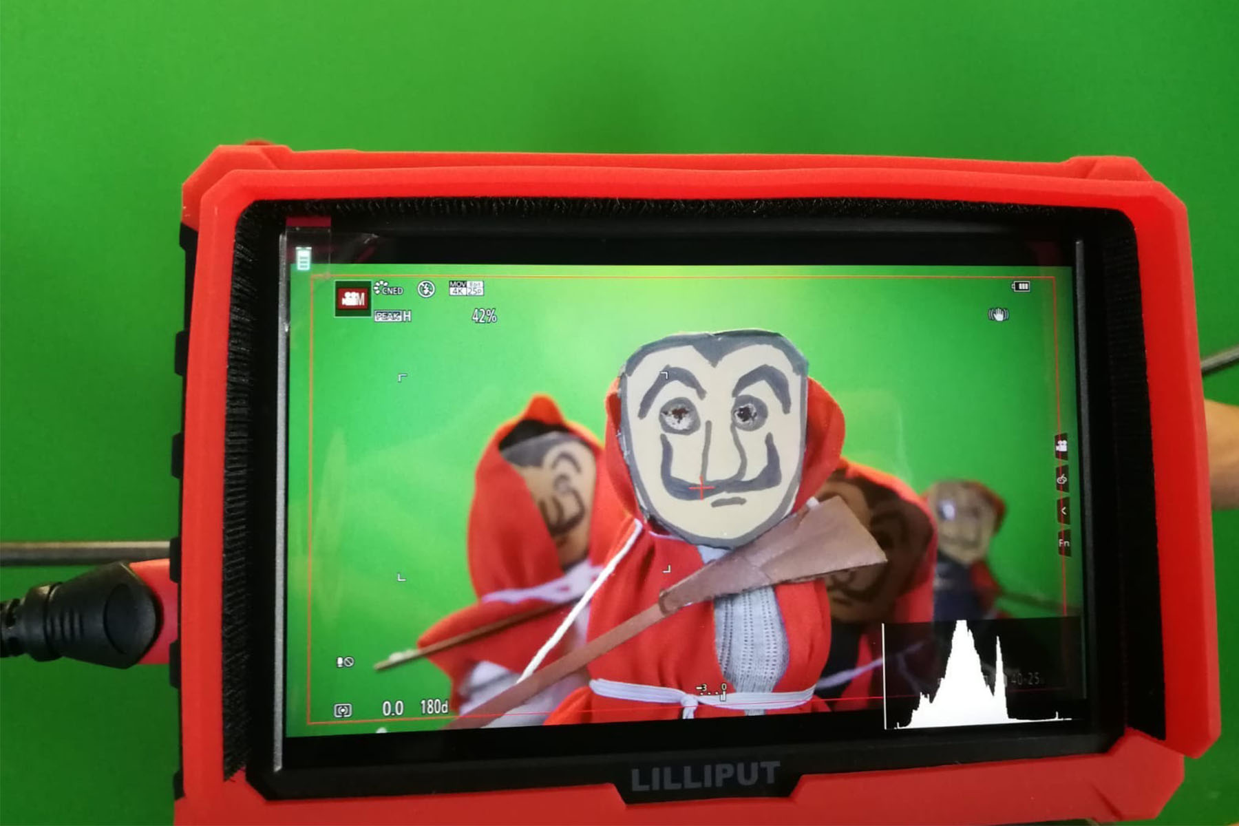 ליל ההלקאות בלה צאו